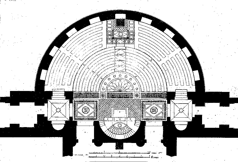 Entwurf von Auguste Henri Victor Grandjean de Montigny